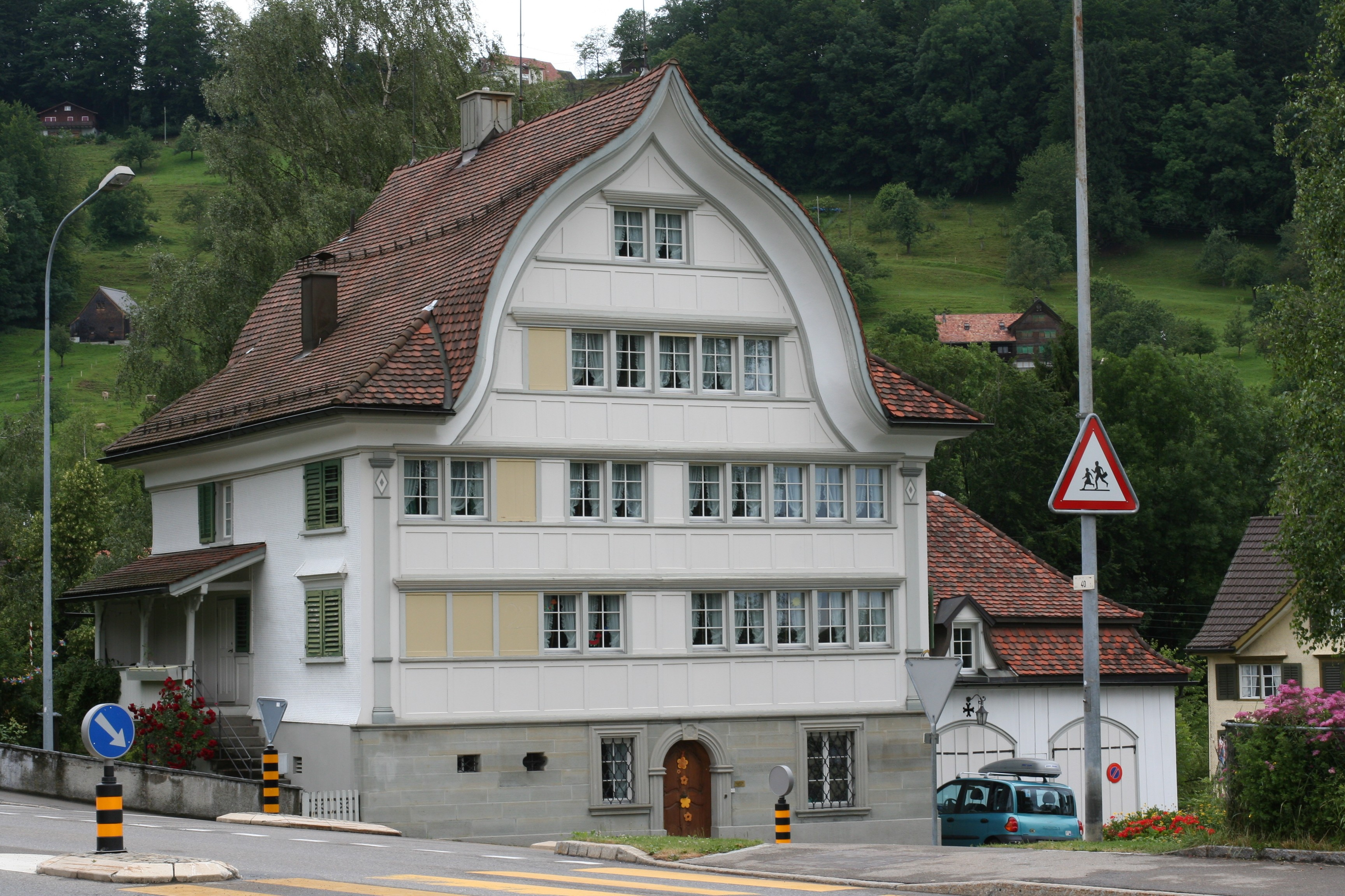 Haus an der Kreuzung Sonnentalstrasse/Heidener Strasse. Die Fassade mit den vielen Fenstern ist typisch für Appenzeller Architektur.